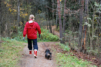 Aarnikanmäki in Pihlajamäki